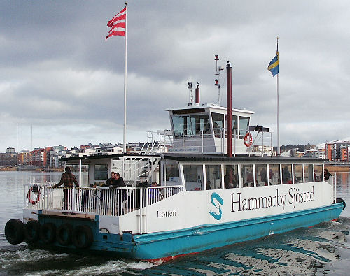 M/S Lotten av Hammarby Sjöstad